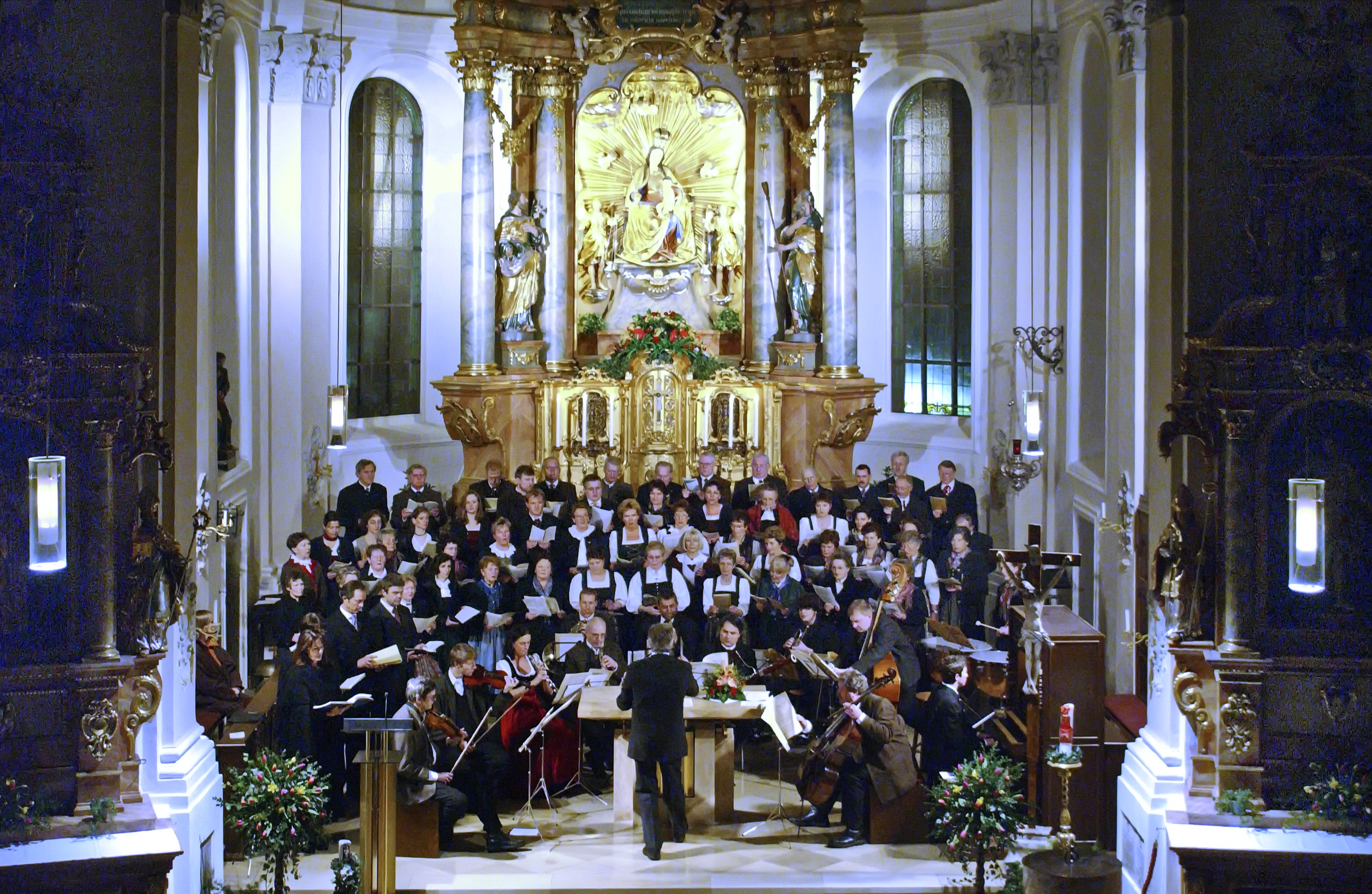 Hans Berger dirigiert den Kichenchor Oberaudorf